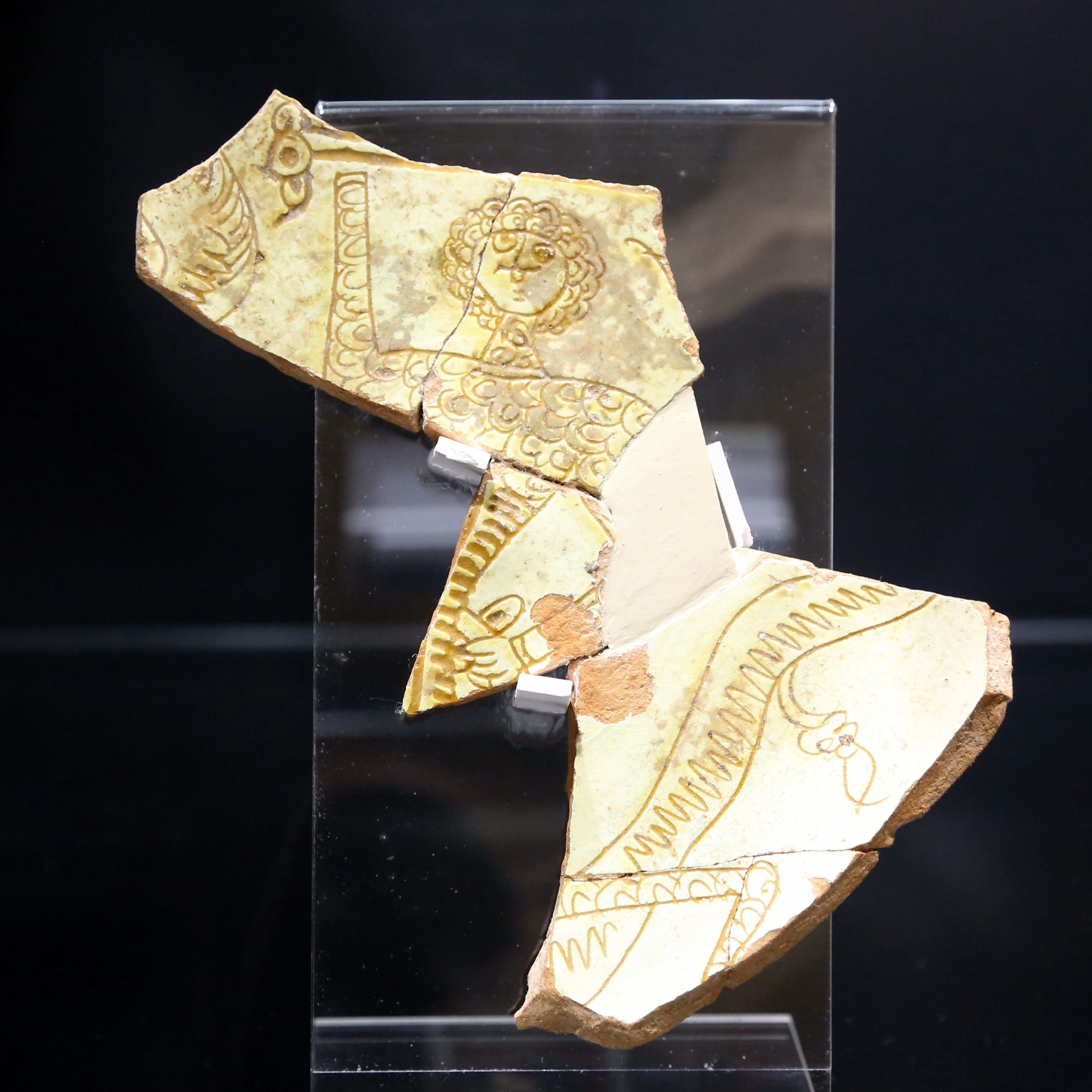 Akritas e il drago Piatto bizantino del XIII secolo Museo Archeologico di Castro (LE)